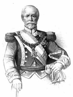 Lorenzo Fernández de Villavicencio Cañas y Portocarrero